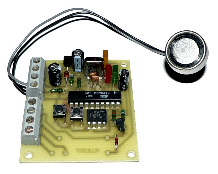 dallas sensor